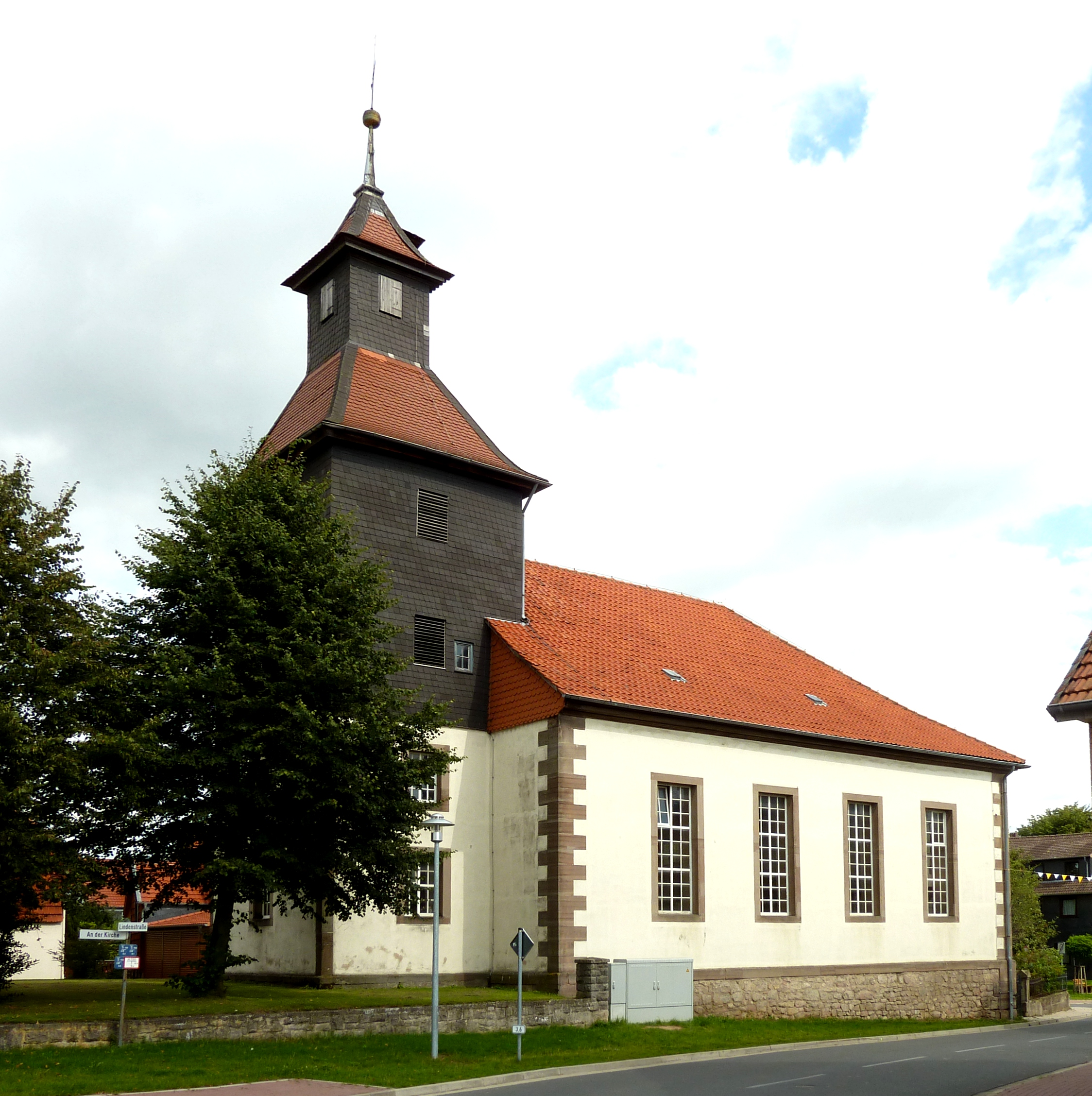 Evangelische Kirche in Mengershausen, Gemeinde Rosdorf, Landkreis Göttingen, Südniedersachsen. Erbaut 1793 durch Georg Heinrich Borheck. Klassizistischer schlichter Putzbau mit Eckquadern und Einfassungen aus Sandstein. Ansicht von Südwesten